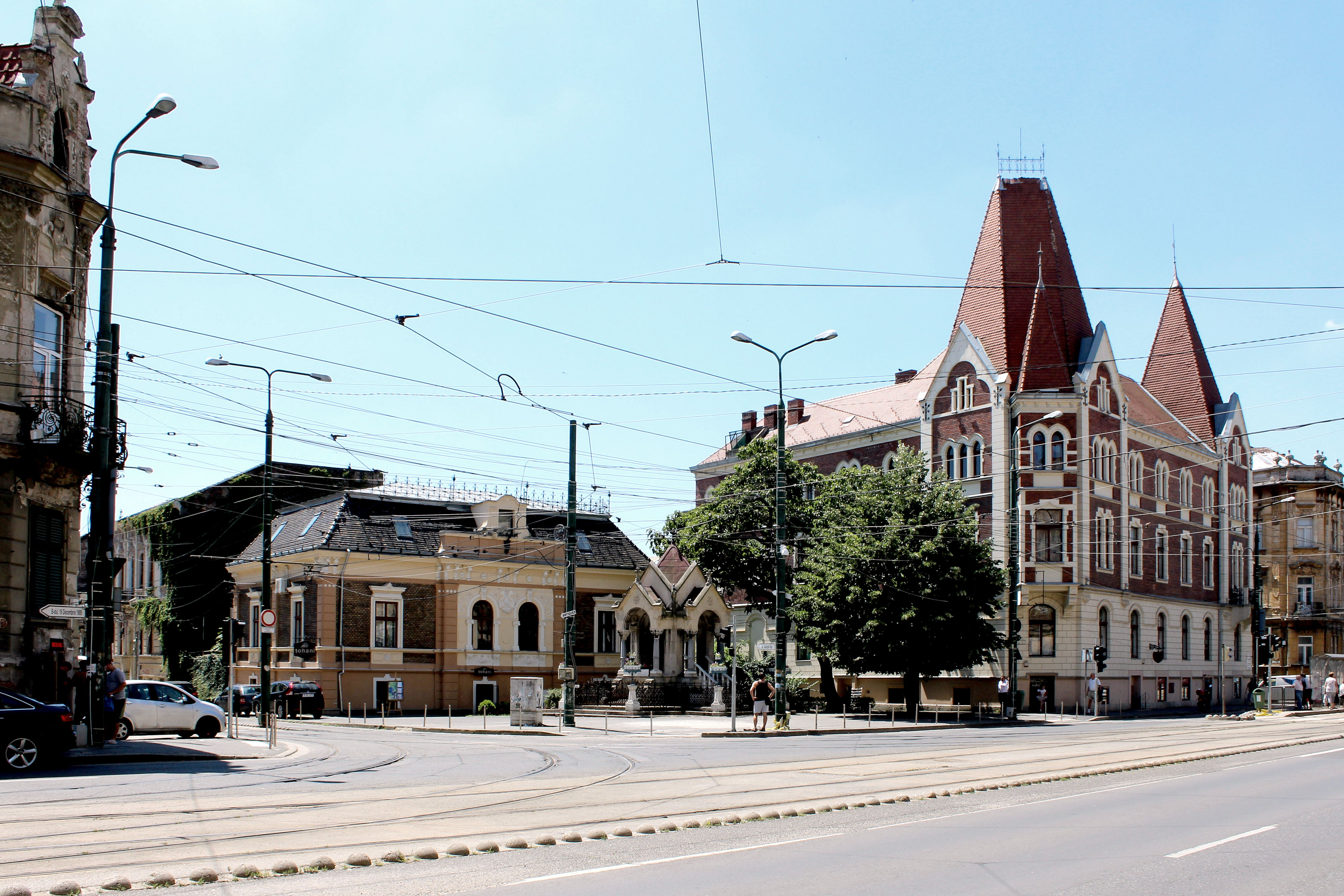 St. Mary Square, Timisoara